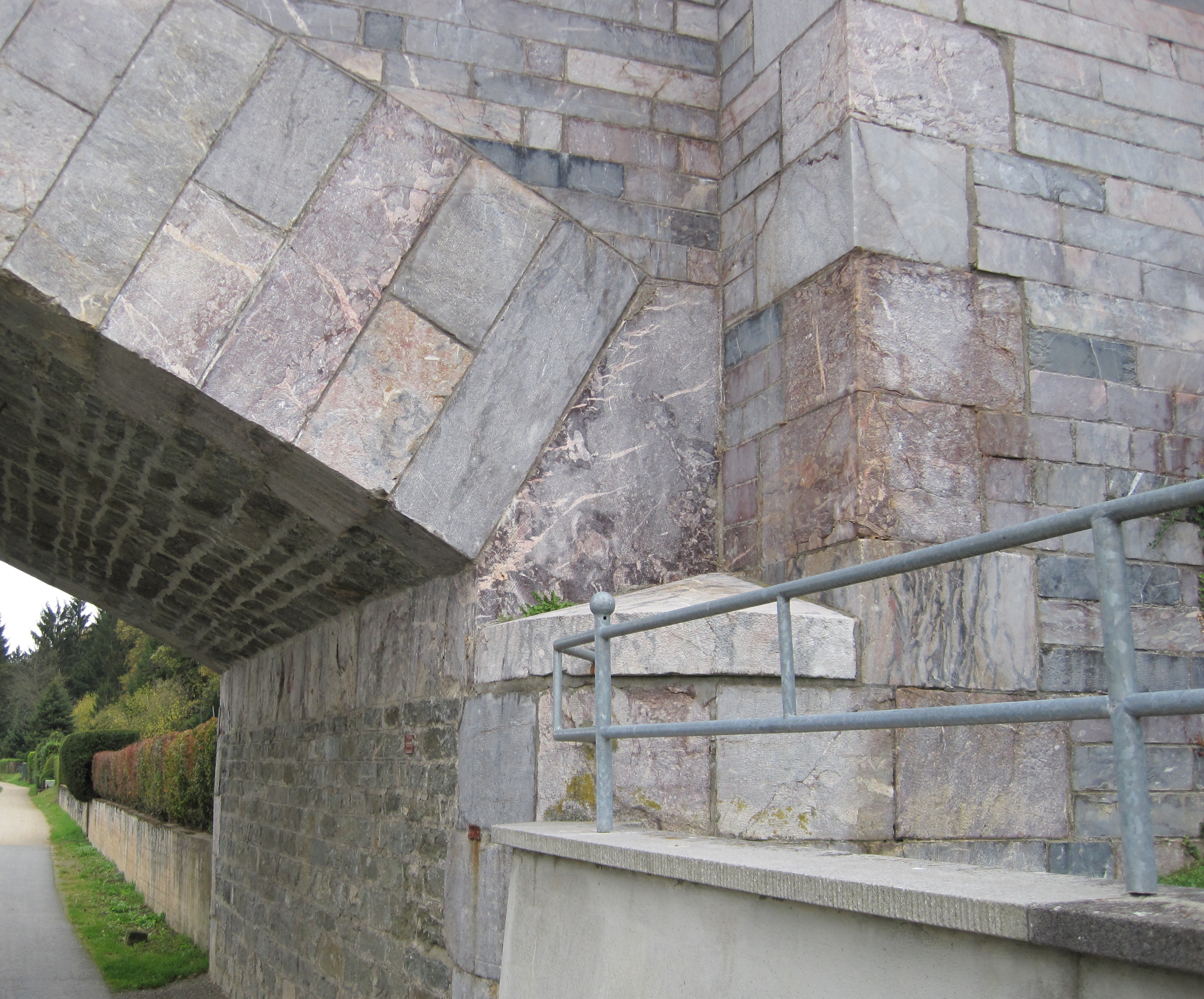 Detail der Marmorbrücke in Villmar an der Lahn.